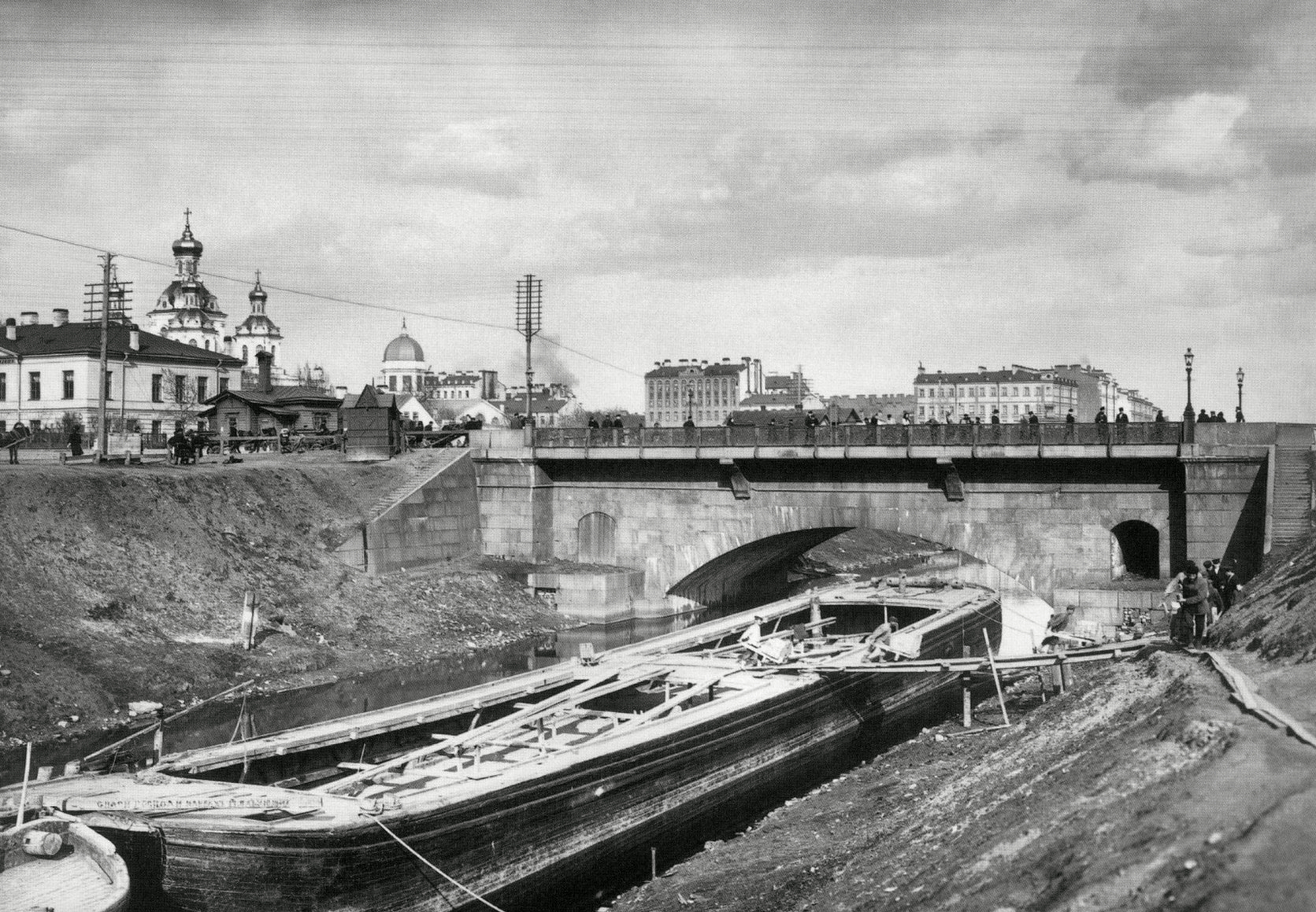 Ново-Каменный мост через Обводный канал в 1900-х гг.